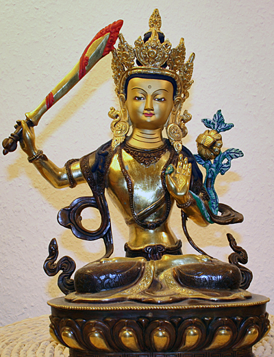 Bodhisattva Manjushri (Nepalesische Statue) Foto: Ines H.